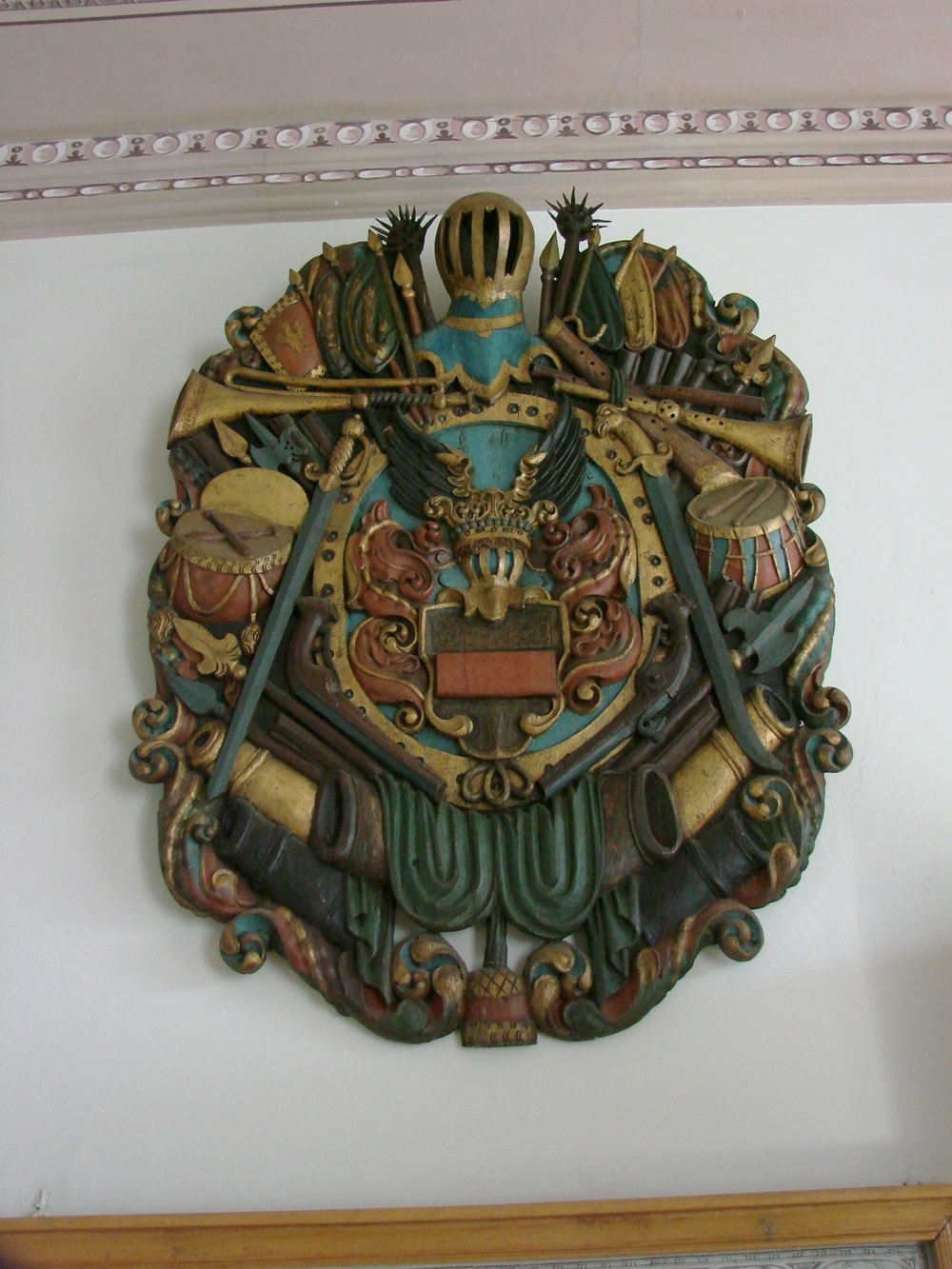 Epitaph der Fam. Manteuffel aus dem ehem. Kirchengebäude in Sternin